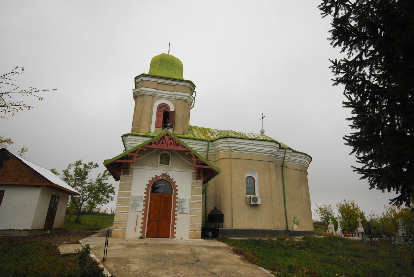 Biserica „Sf. Gheorghe”